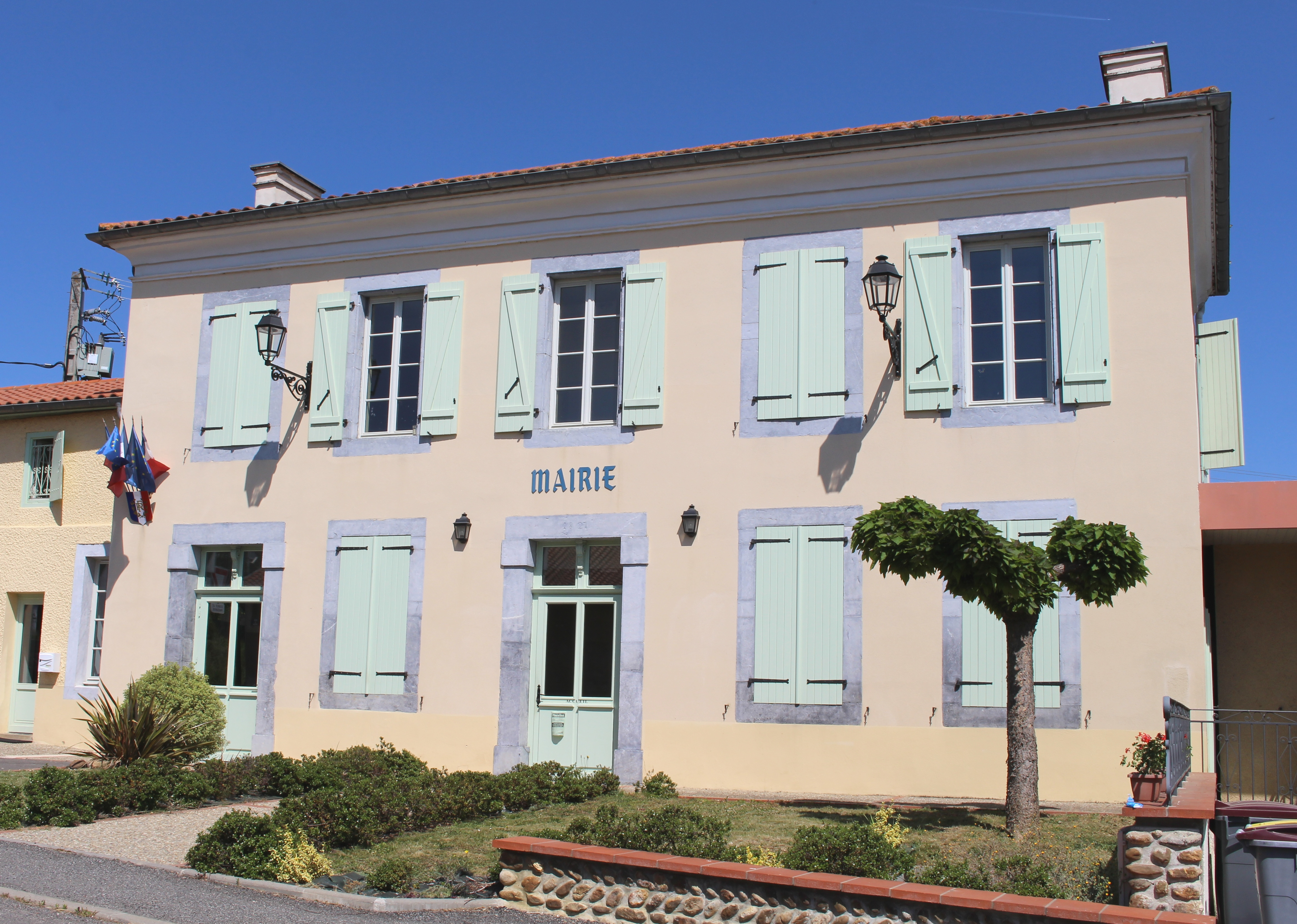 Mairie de Souyeaux (Hautes-Pyrénées)